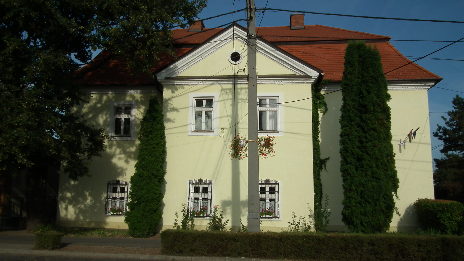 v. Szepessy kúria (Nyékládháza, Kossuth Lajos u. 60.) This is a photo of a monument in Hungary. Identifier: 3005